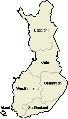 Namen der "Lääni" Finnlands